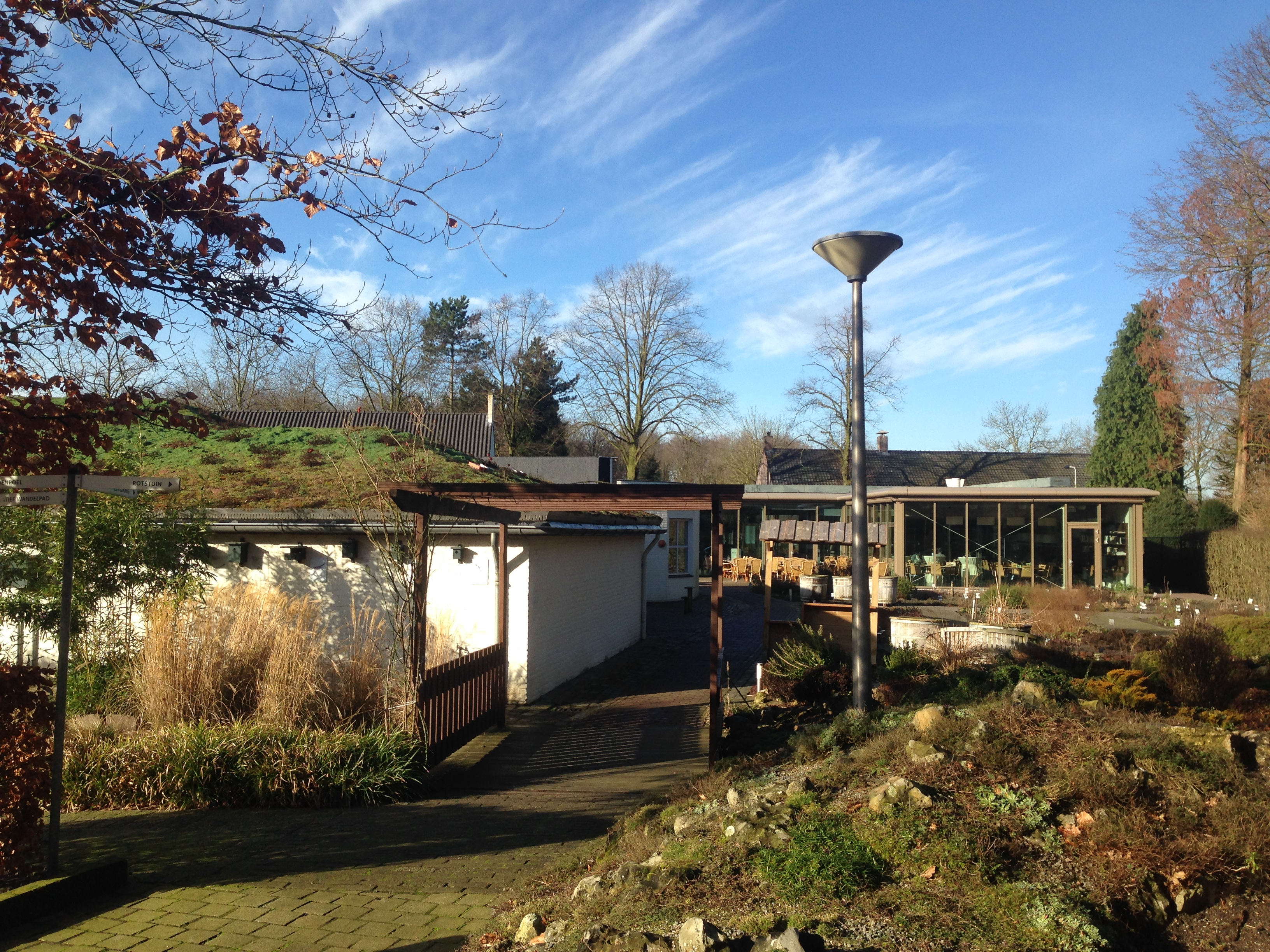 Museum Klok & Peel, Asten, Netherlands